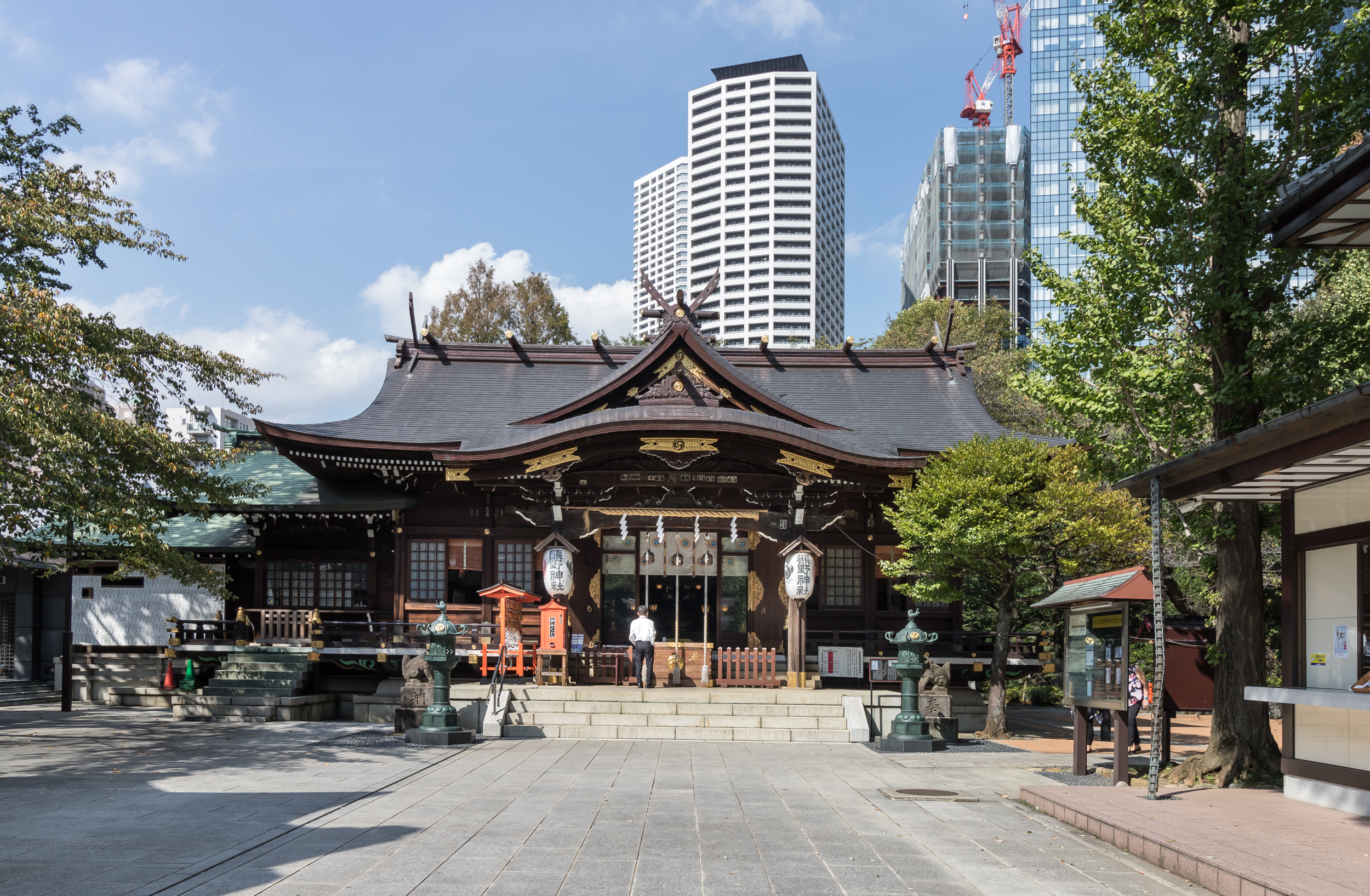 熊野神社（東京都新宿区）